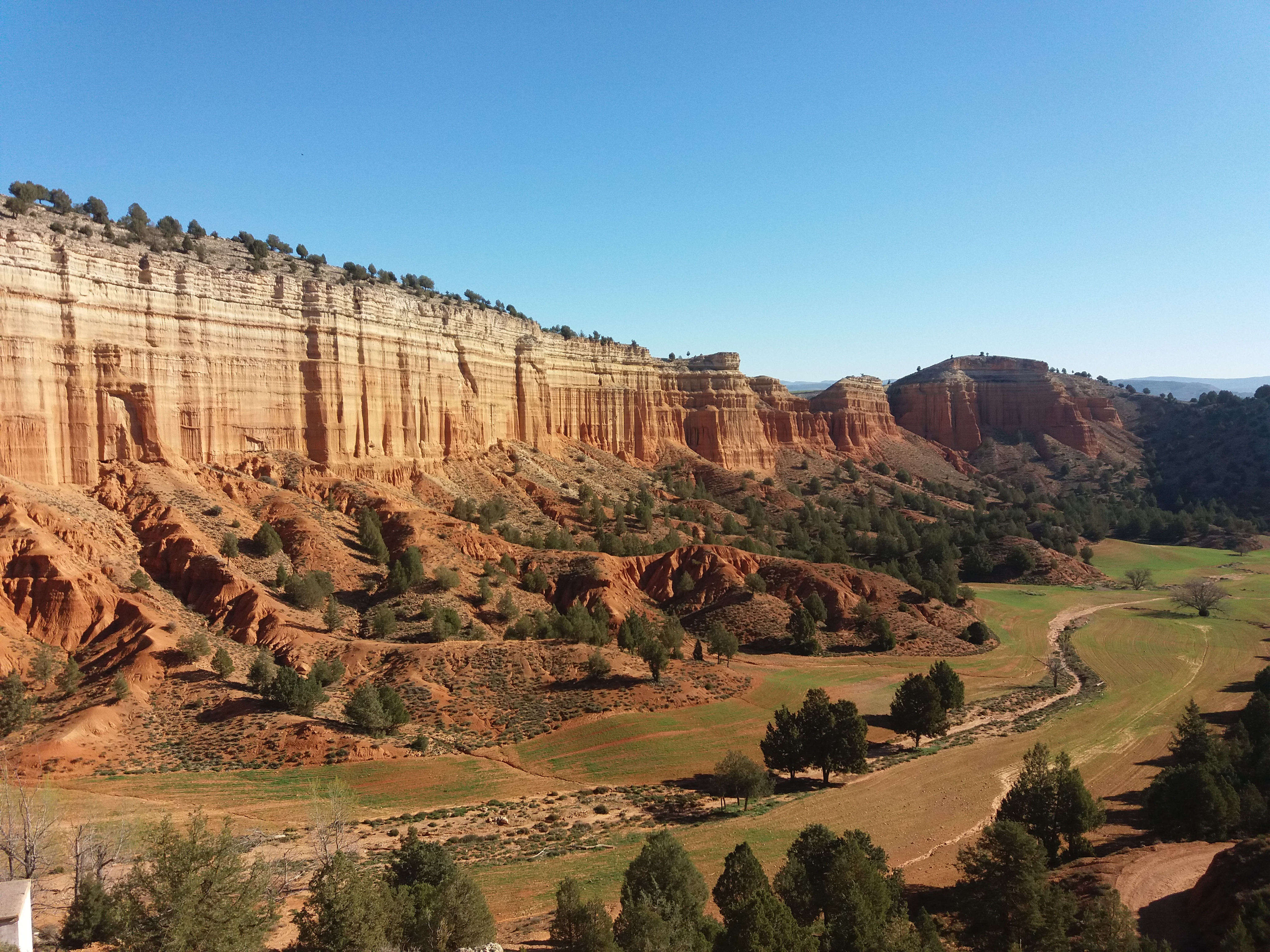 Yesos de Barrachina y Cutanda en Teruel